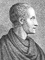 Ludwig Hölty, zeitgenössische Darstellung (Künstler unbekannt)